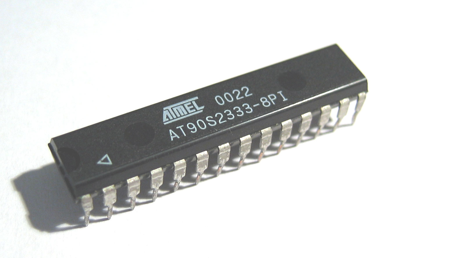 AT90S2333 - Mikrocontroller von Atmel